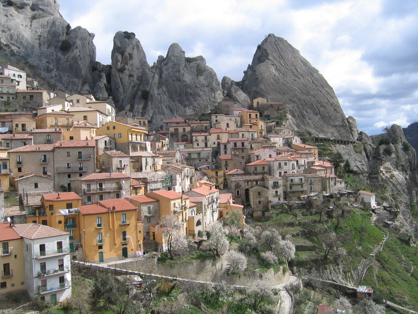 Veduta di Castelmezzano (Pz)